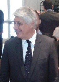 Philippe Martin, au Ministère de l'écologie, du développement durable et de l'énergie.